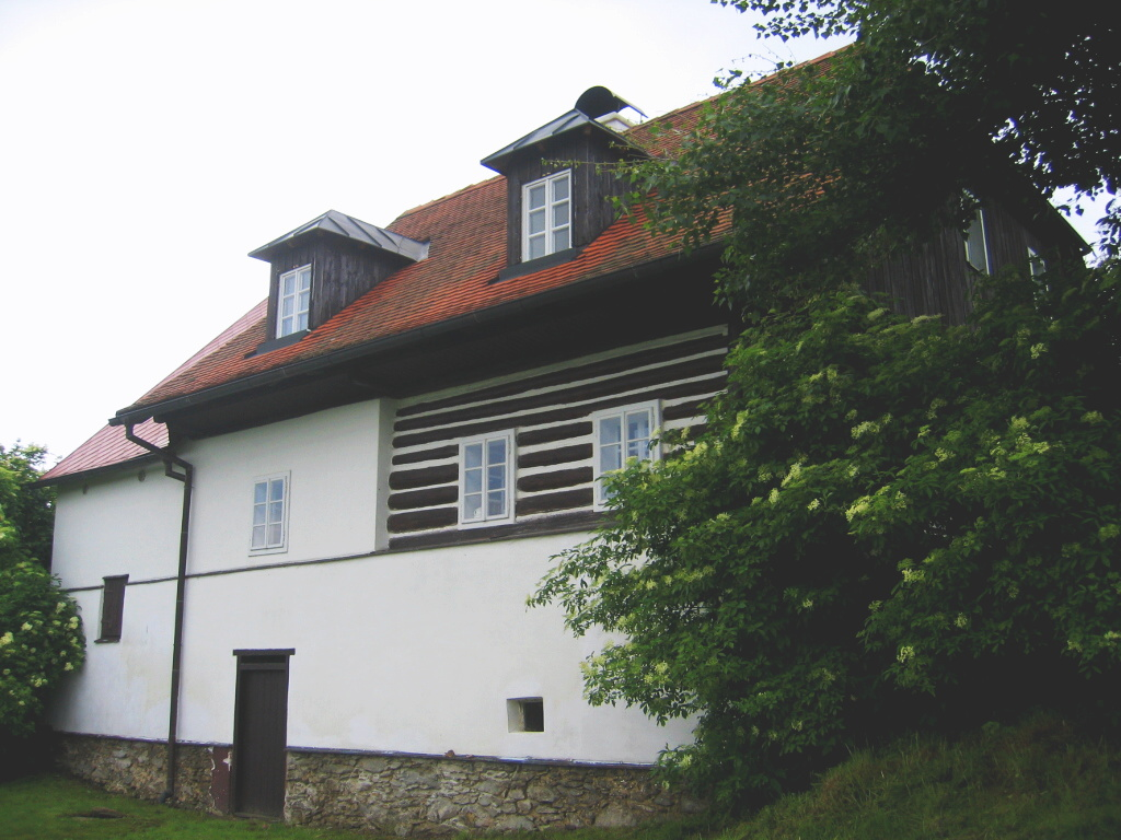 Albrechtice u Sušice (okr. Klatovy), čp. 40 od severu, detail.